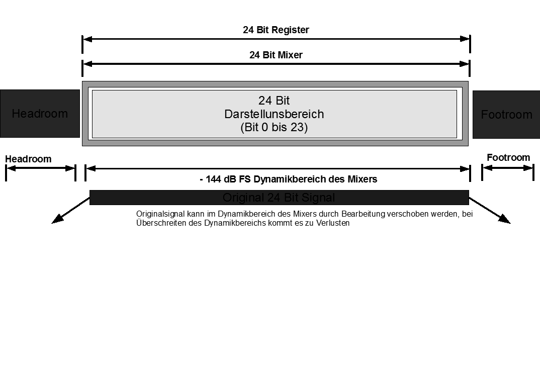 Signaldynamikbereich eines 24 Bit Mixers